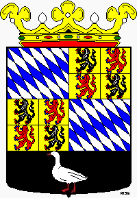 Wapen gemeente Goes "Gevierendeeld : I en IV spitsgeruit van zilver en azuur, II en III opnieuw gevierendeeld met in a en d in goud een leeuw van sabel, getongd en genageld van keel, en in b en c in goud een leeuw van keel, getongd en genageld van azuur; een schildvoet van sabel met een gans van zilver, gebekt en gepoot van keel. Het schild gedekt met een gouden kroon van 3 bladeren en 2 paarlen."